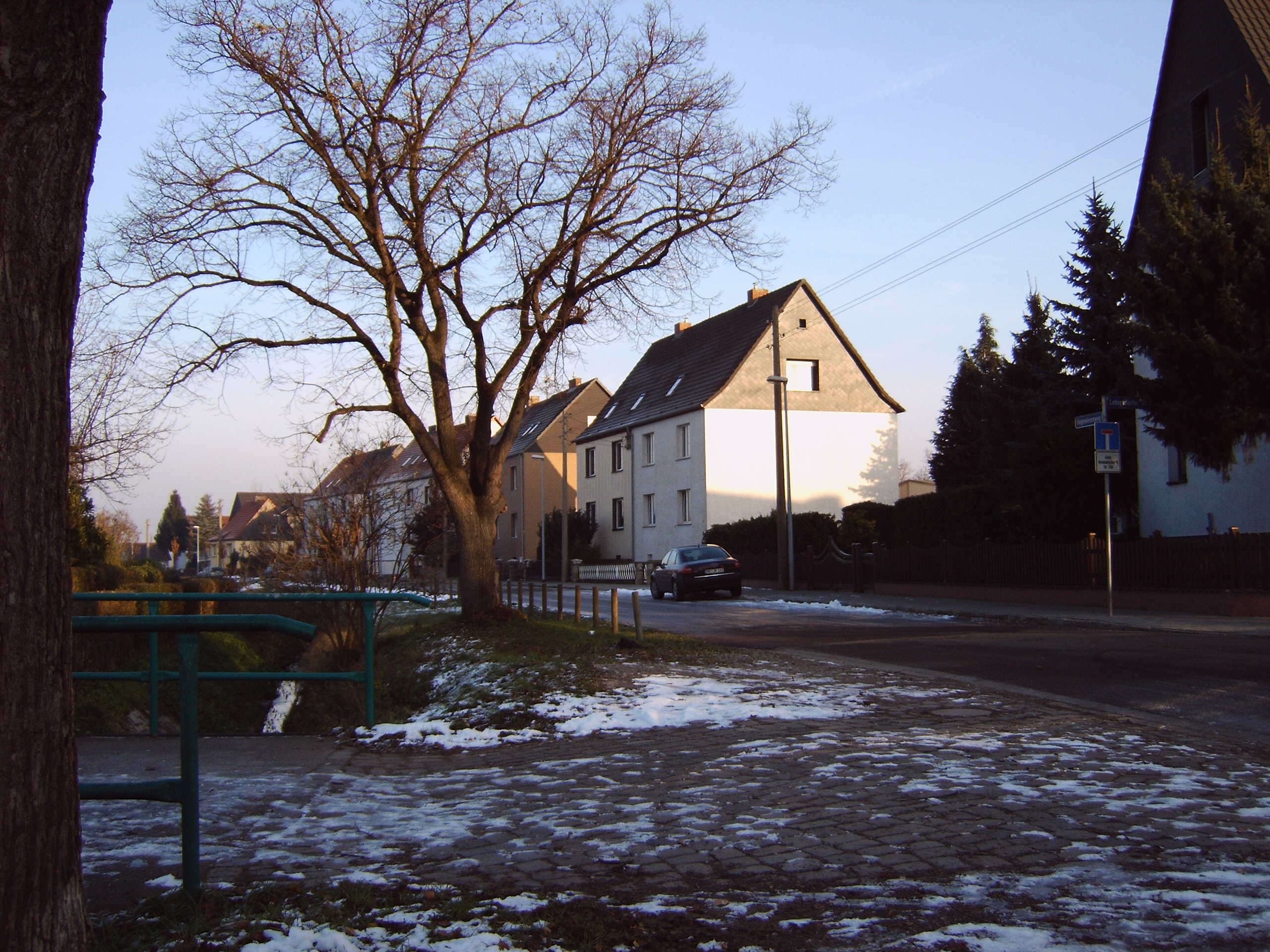 Hegewiesenweg in Magdeburg, Gebiet der Wüstung Ostendorf Bild aufgenommen am 2.12.2005 durch Olaf2